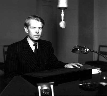 Suomalainen runoilija-esteetikko Kaarlo Sarkia (1902-1945)